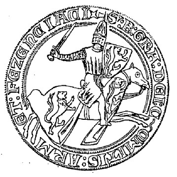 Bernard VI d'Armagnac